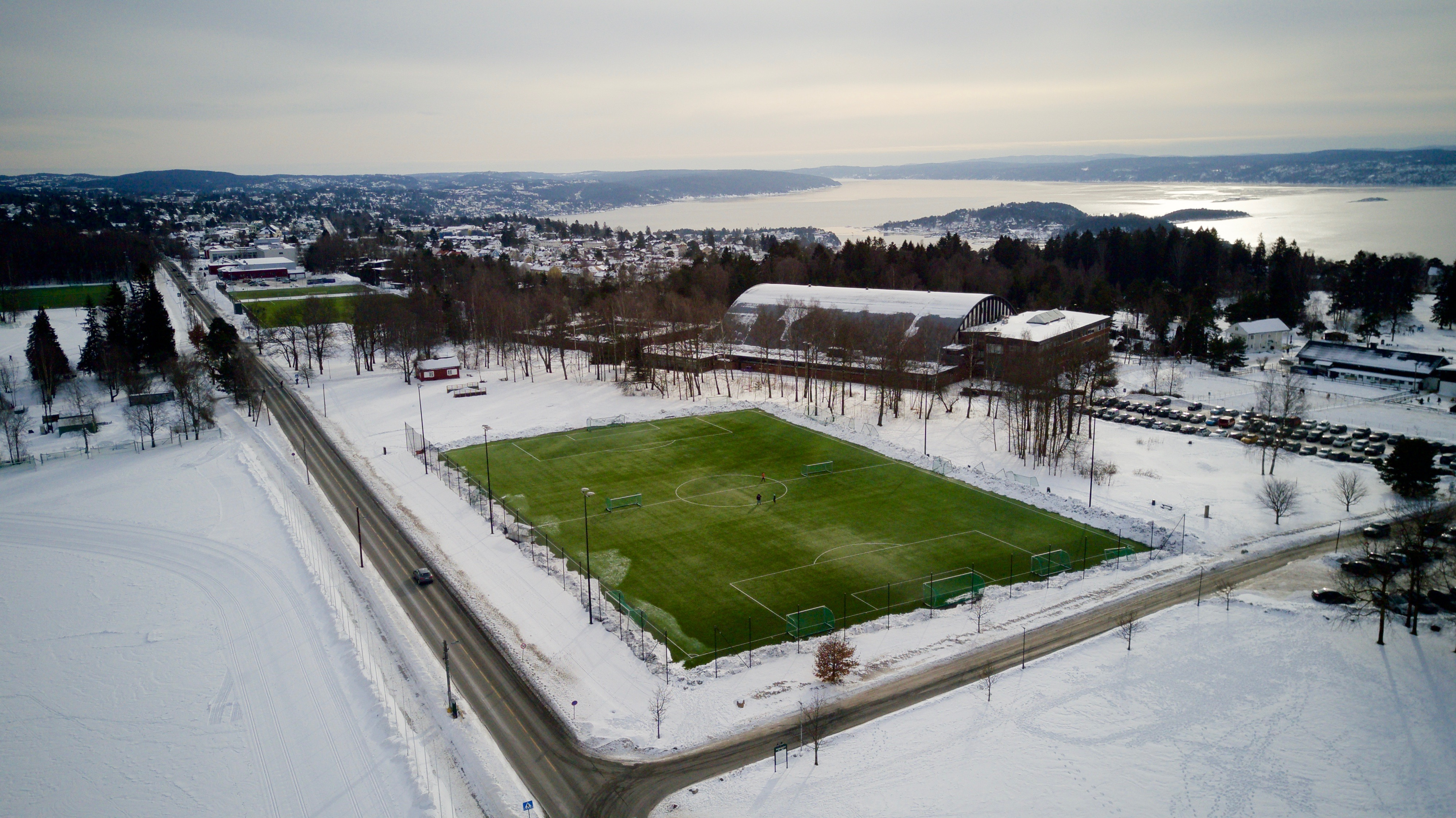 Ekeberg kunstgress, med Ekeberghallen i bakgrunnen.